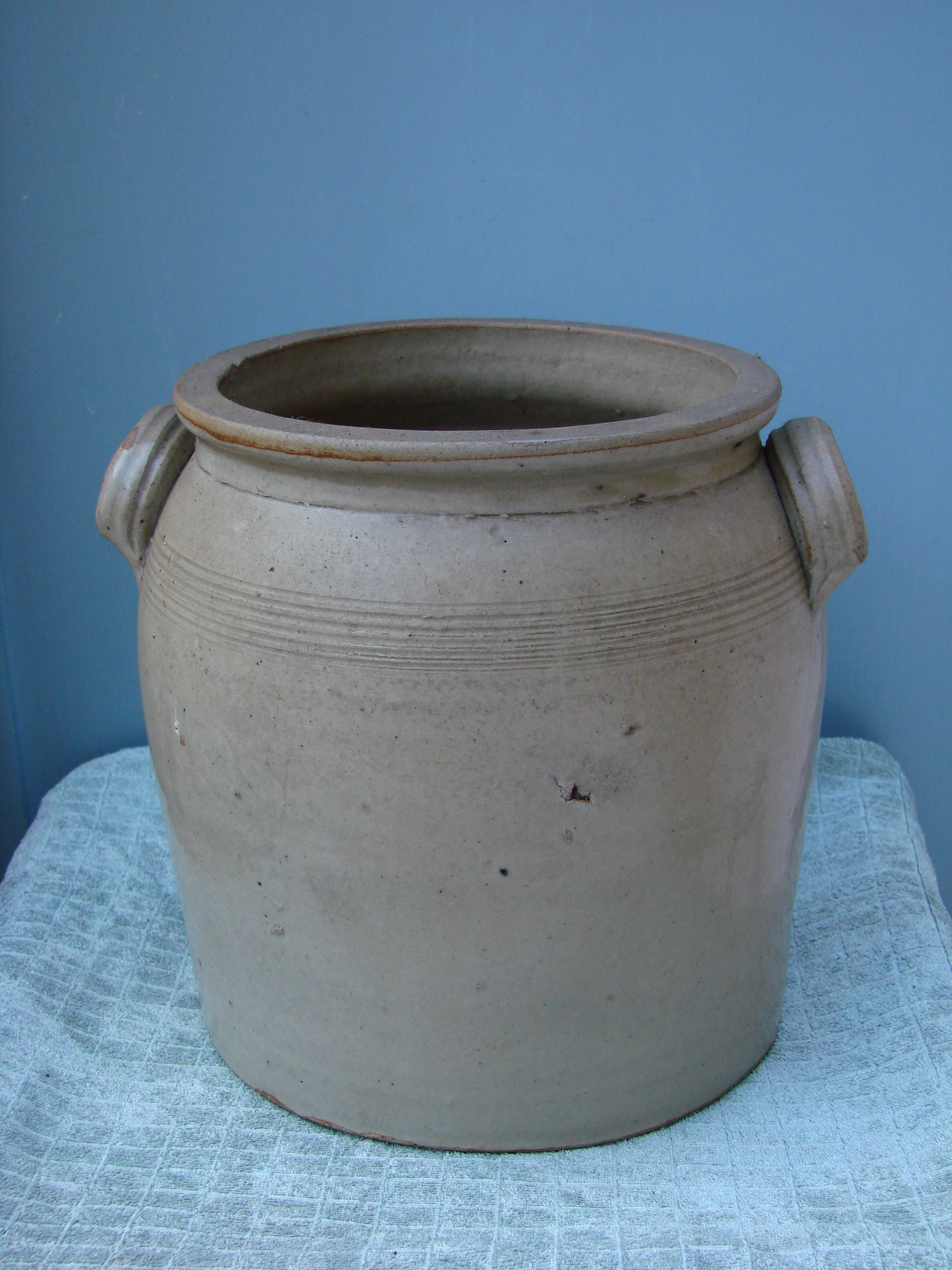 Pot en grès vernissé, origine France